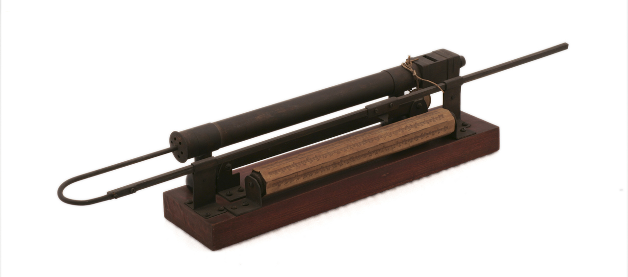 Il tonografo è costituito da un tubo in ottone montato su una base in legno di forma rettangolare e da un rullo di legno, parallelo al tubo, provvisto di scale graduate e numerate. Il tubo presenta l'estremità sinistra chiusa, mentre sul lato destro si trova un'imboccatura in legno tornito. All'interno del tubo si muove uno stantuffo, al quale è connessa un'asta ricurva uscente dal lato sinistro del tubo. Una barra in ottone dotata di un indicatore è attaccata all'estremità ricurva dell'asta in modo tale che il movimento dello stantuffo comporti lo spostamento dell'indicatore lungo la scala graduata del rullo di legno. Funzione Riproduzione di suoni Modalità d'uso Collegare un mantice all'imboccatura del tubo e soffiare aria all'interno del tubo. Spostanto lo stantuffo, si modifica il percorso dell'aria all'interno del tubo e si varia di conseguenza l'intonazione del suono prodotto Attraverso l'indicatore sulla barra è possibile associare ad ogni posizione dello stantuffo un corrispondente numero sulla scala numerata. Notizie storico-critiche Il Tonografo, presentato nel 1841 a Firenze da Luca S. Cagnazzi durante la terza riunione degli Scienziati italiani, rappresenta un tentativo di risoluzione al problema della conservazione delle informazioni per le generazioni future. Associando un numero alle diverse intonazioni e inflessioni della voce, infatti, l'intenzione di Cagnazzi era quella di descrivere le voci e le varie modulazioni attraverso sequenze numeriche in modo da facilitarne successive riproduzioni; non potendo conservare il suono, dunque, si cercava di fornirne quantomeno descrizioni fedeli.